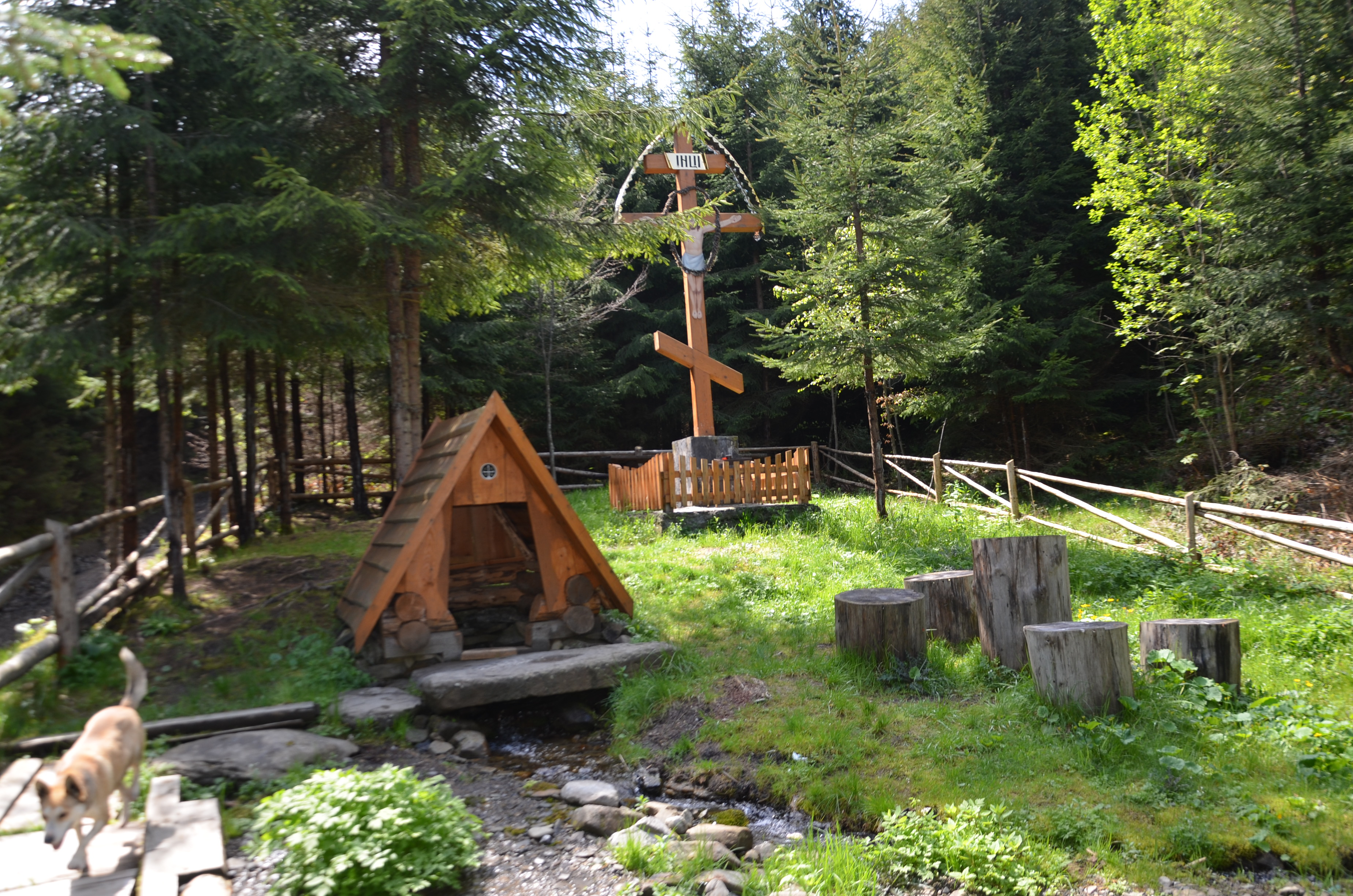 Святе джерело в селі Гукливий